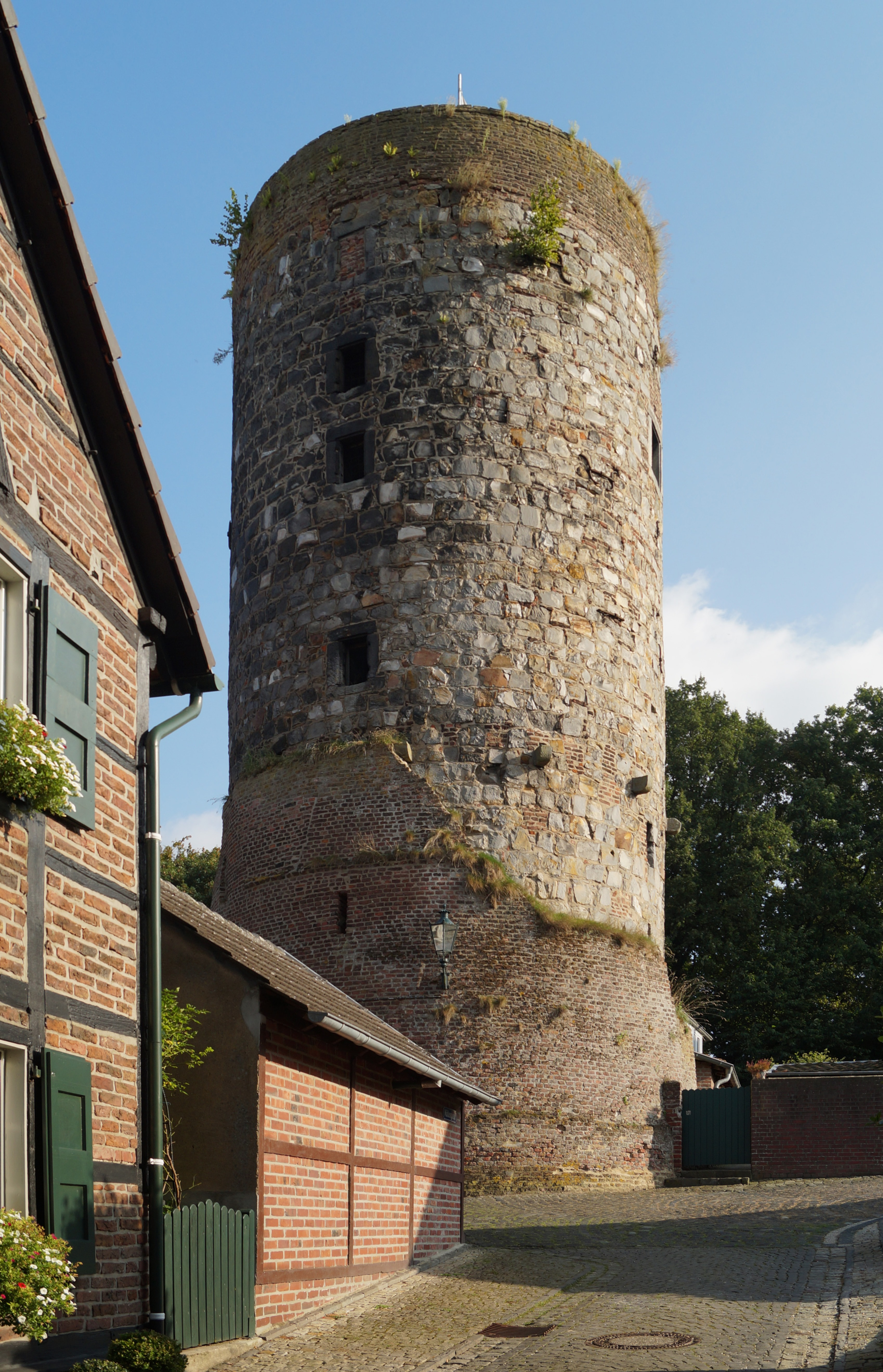 Mühlenturm Liedberg von der Mühlengasse